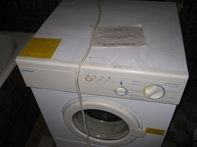 Pralka Polar PDG 385. Tyle, że to jest starsza wersja z lat 1992-1994